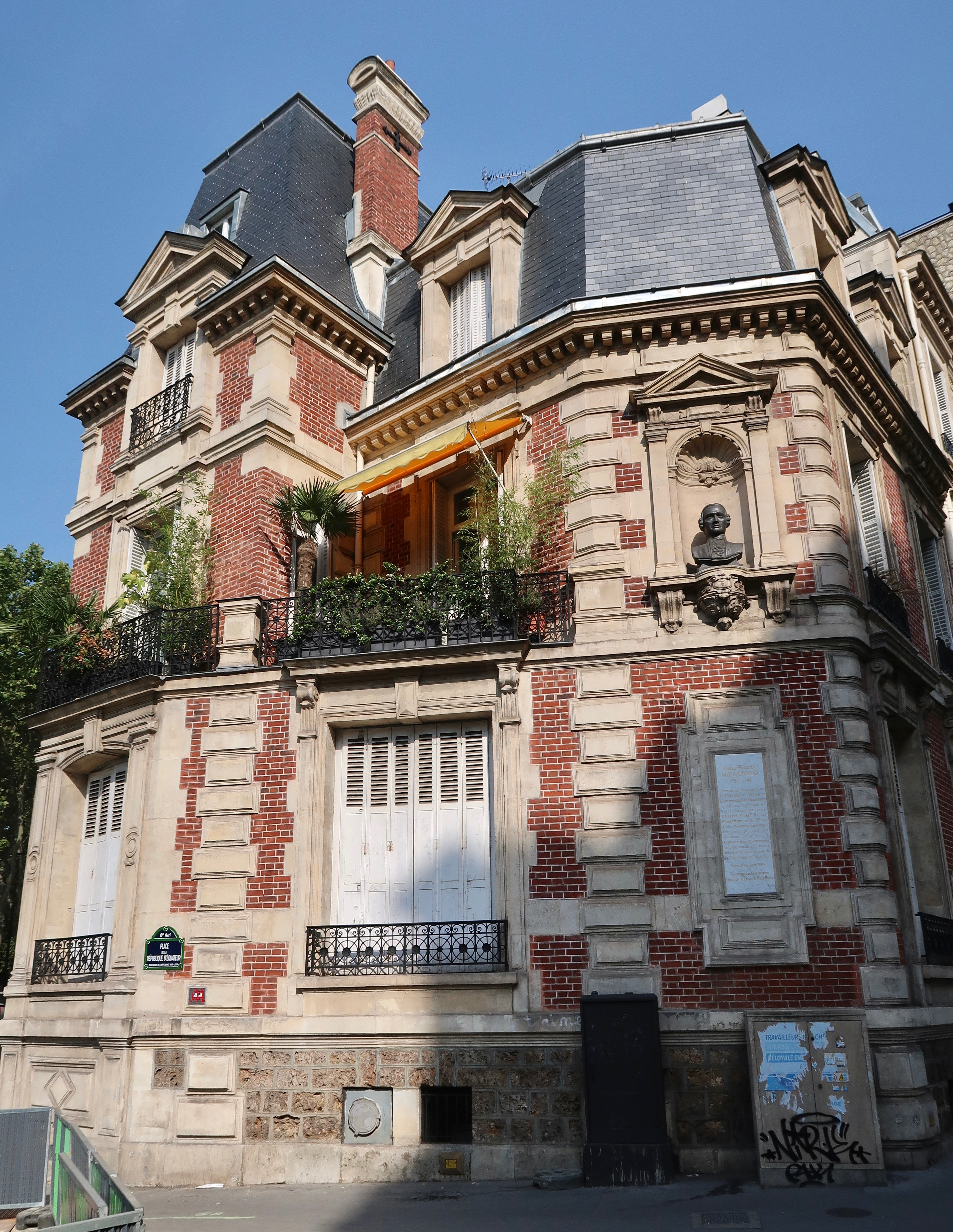 Immeuble 53 boulevard de Courcelles et place de la République-de-l'Équateur (Paris, 8e).